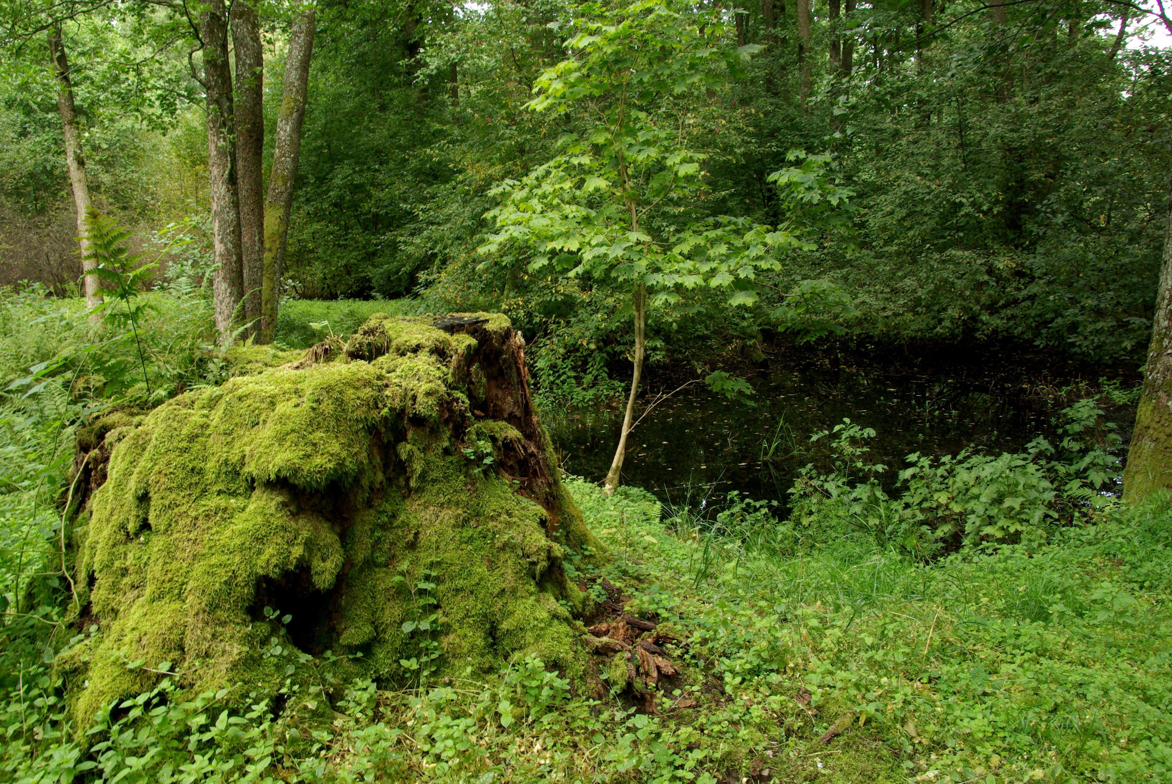 Maardu hiiemets on hiis Jõelähtme kihelkonna Saha ja Maardu külas